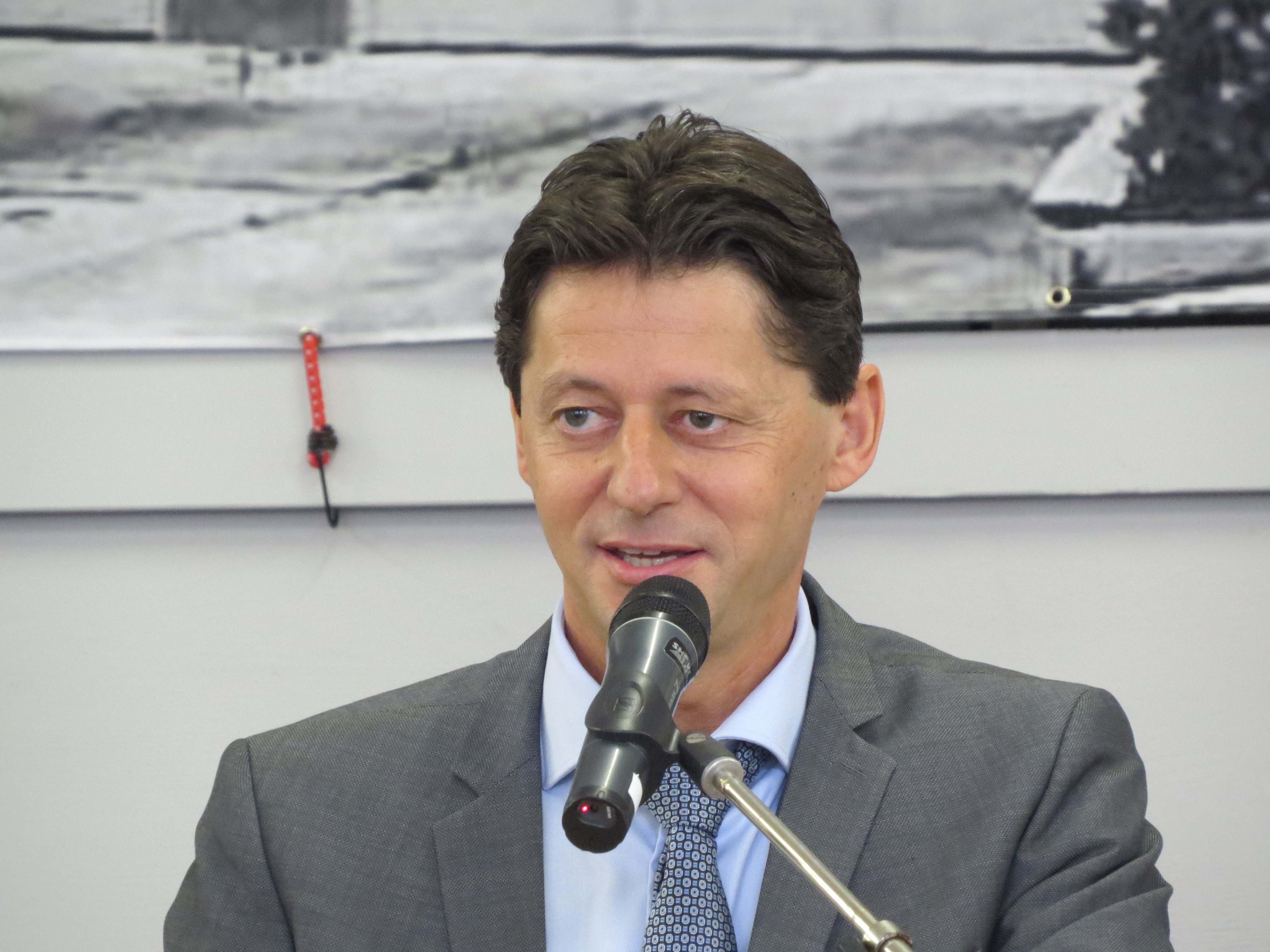 Bezirkshauptmann Mag. Johann Seper bei der Segnung des Feuerwehrhaus und Musikerheim in St. Georgen an der Leys